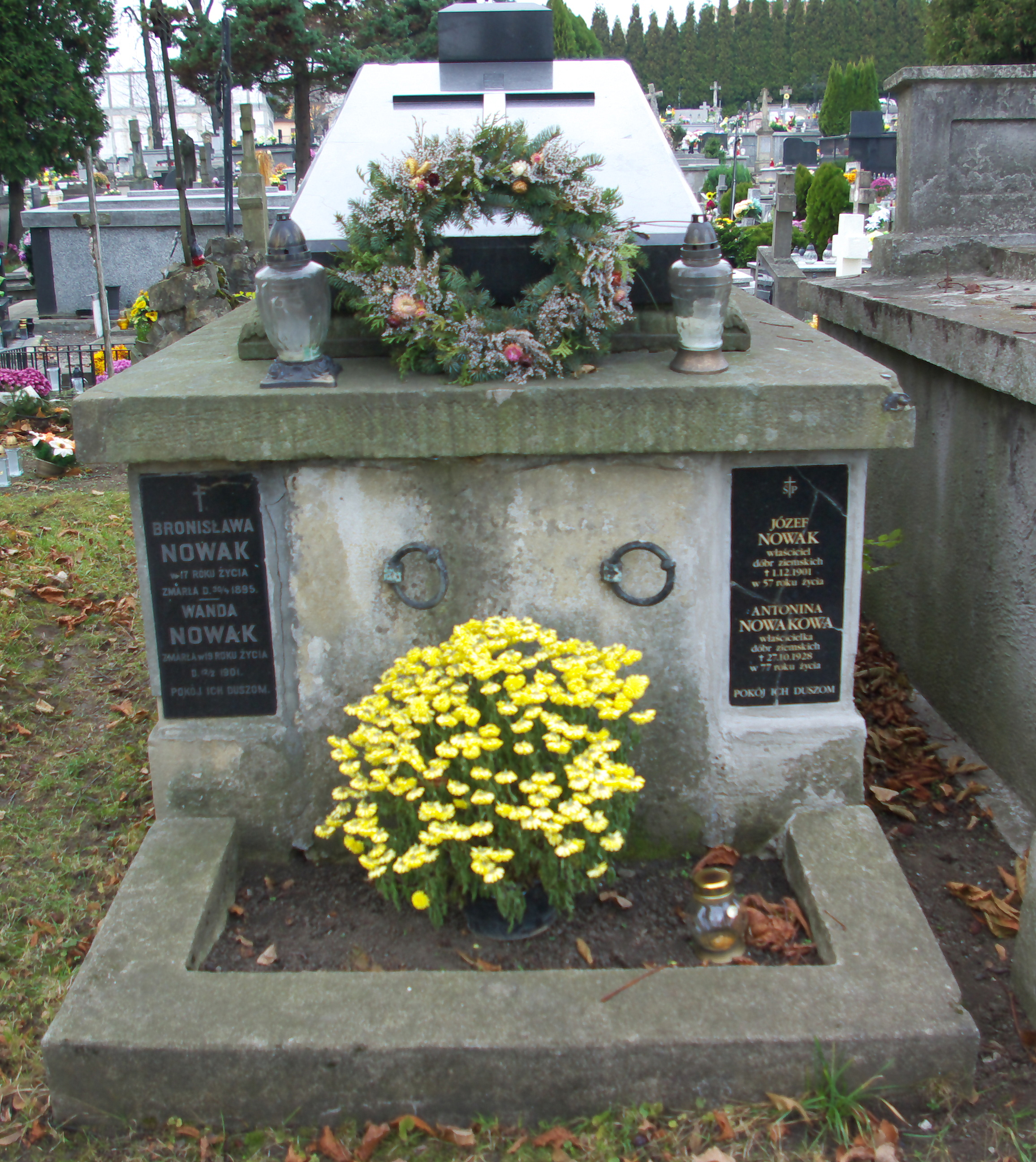 Grobowiec rodziny Nowak (Józef, Antonina, Bronisława, Wanda) na Cmentarzu Centralnym w Sanoku